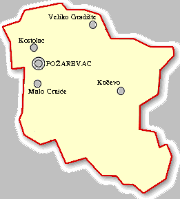 Bezirk Branicevo